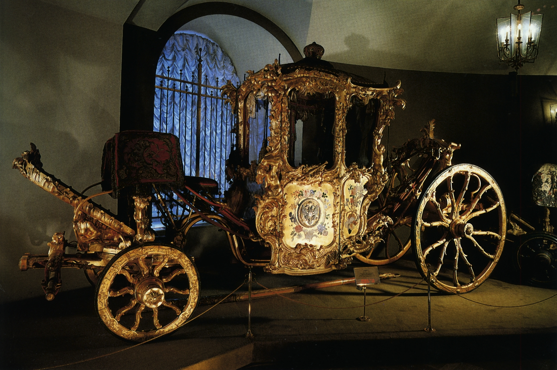 Карета. Подарена императрице Елизавете Петровне прусским королем Фридрихом II